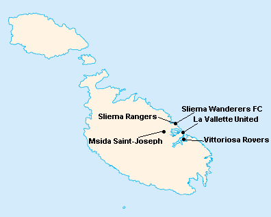 Répartition des clubs en First Division Maltaise 1923-1924.